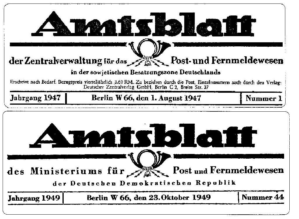 DDR-Amtsblätter (gescannt von W.Steven, 2006)